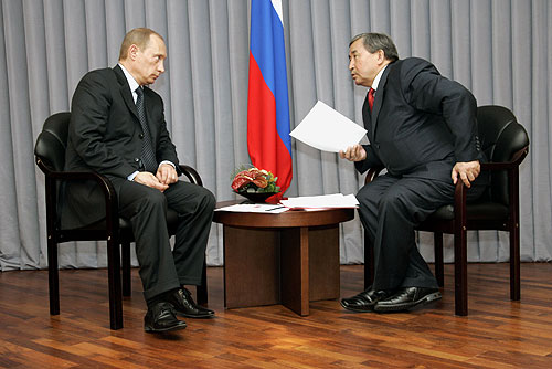 ТОМСК. Председатель Правительства Республики Тыва Шериг-оол Ооржак на рабочей встрече с Президентом Российской Федерации Владимиром Путиным.